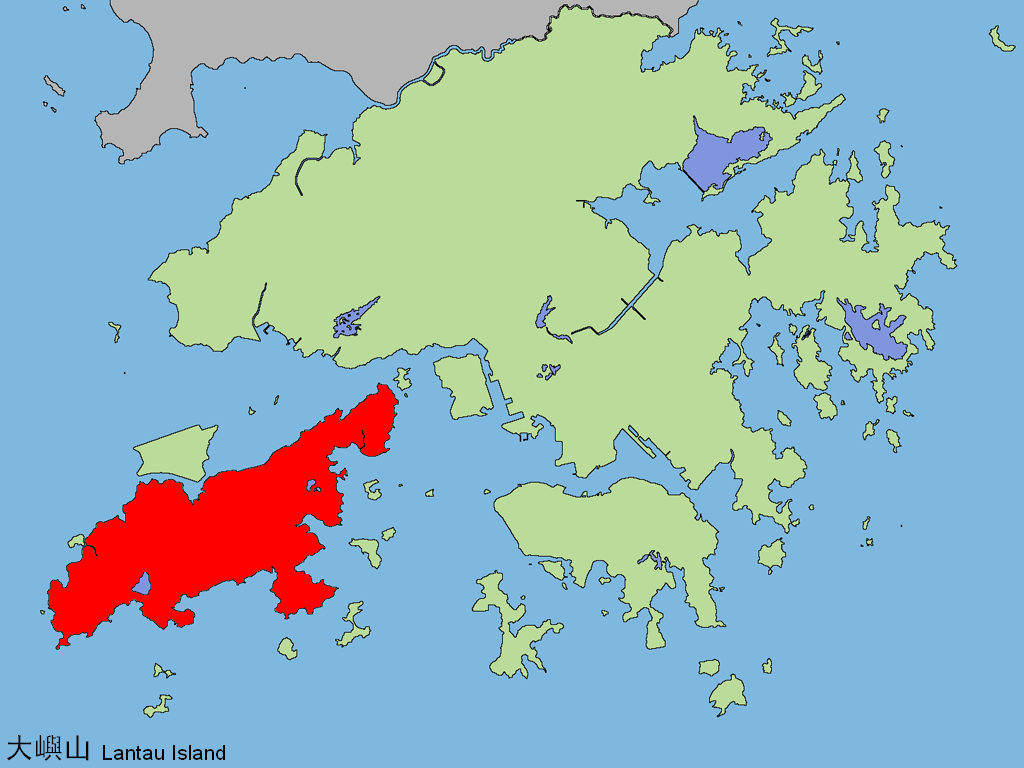 中文（香港）: 大嶼山。